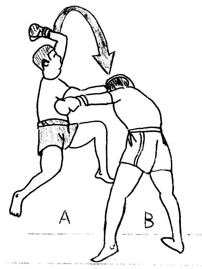 coude_saute.jpg